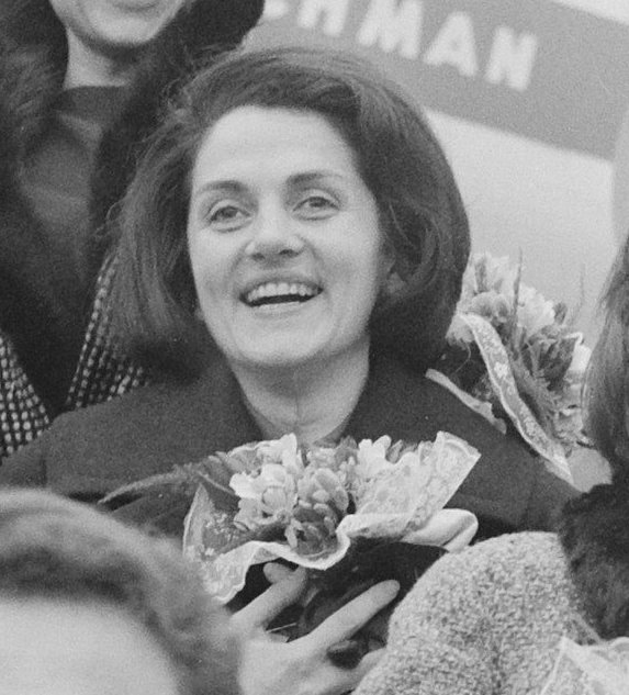 Collectie / Archief : Fotocollectie Anefo Reportage / Serie : [ onbekend ] Beschrijving : De Franse vocale groep "Les Swingle Singers" uit Parijs op Schiphol voor optreden Avro Datum : 4 maart 1964 Locatie : Noord-Holland, Schiphol Trefwoorden : Optredens Instellingsnaam : AVRO Fotograaf : Gelderen, Hugo van / Anefo Auteursrechthebbende : Nationaal Archief Materiaalsoort : Negatief (zwart/wit) Nummer archiefinventaris : bekijk toegang 2.24.01.03 Bestanddeelnummer : 916-1366